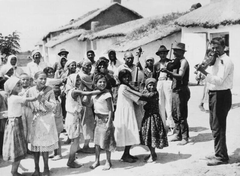 Ungarn, Sinti und Roma beim Tanzen Tanzende Zigeuner in einem ungarischen Dorf. 1928. [Ungarn.- Sinti und Roma beim Tanzen, Männer Geige spielend]